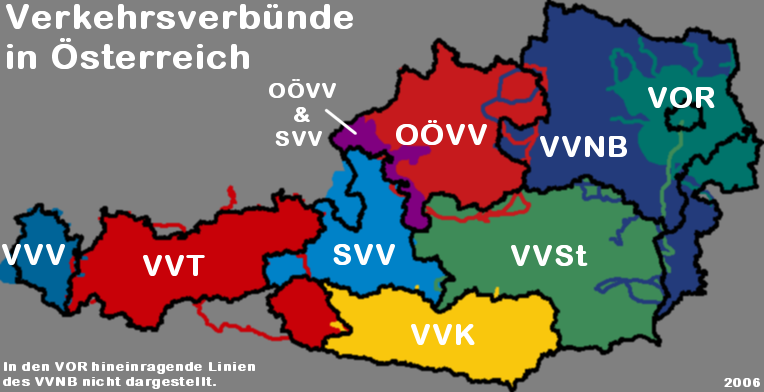 Verkehrsverbünde in Österreich